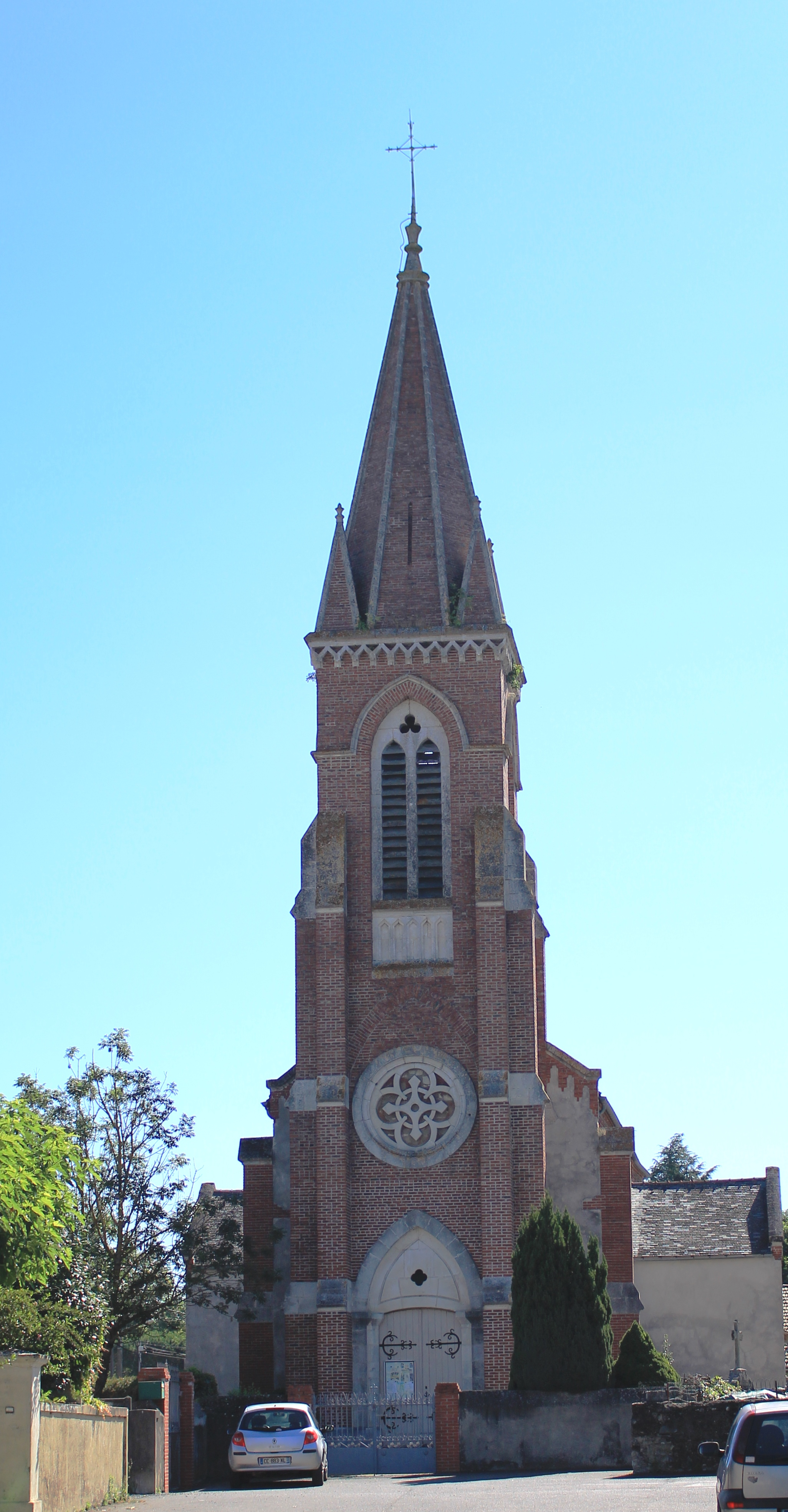 Église Saint-Séverin d'Aurensan (Hautes-Pyrénées)